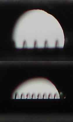 Makroaufnahme der Steuergitter der Röhren ECC82 (oben) und ECC83 (unten).